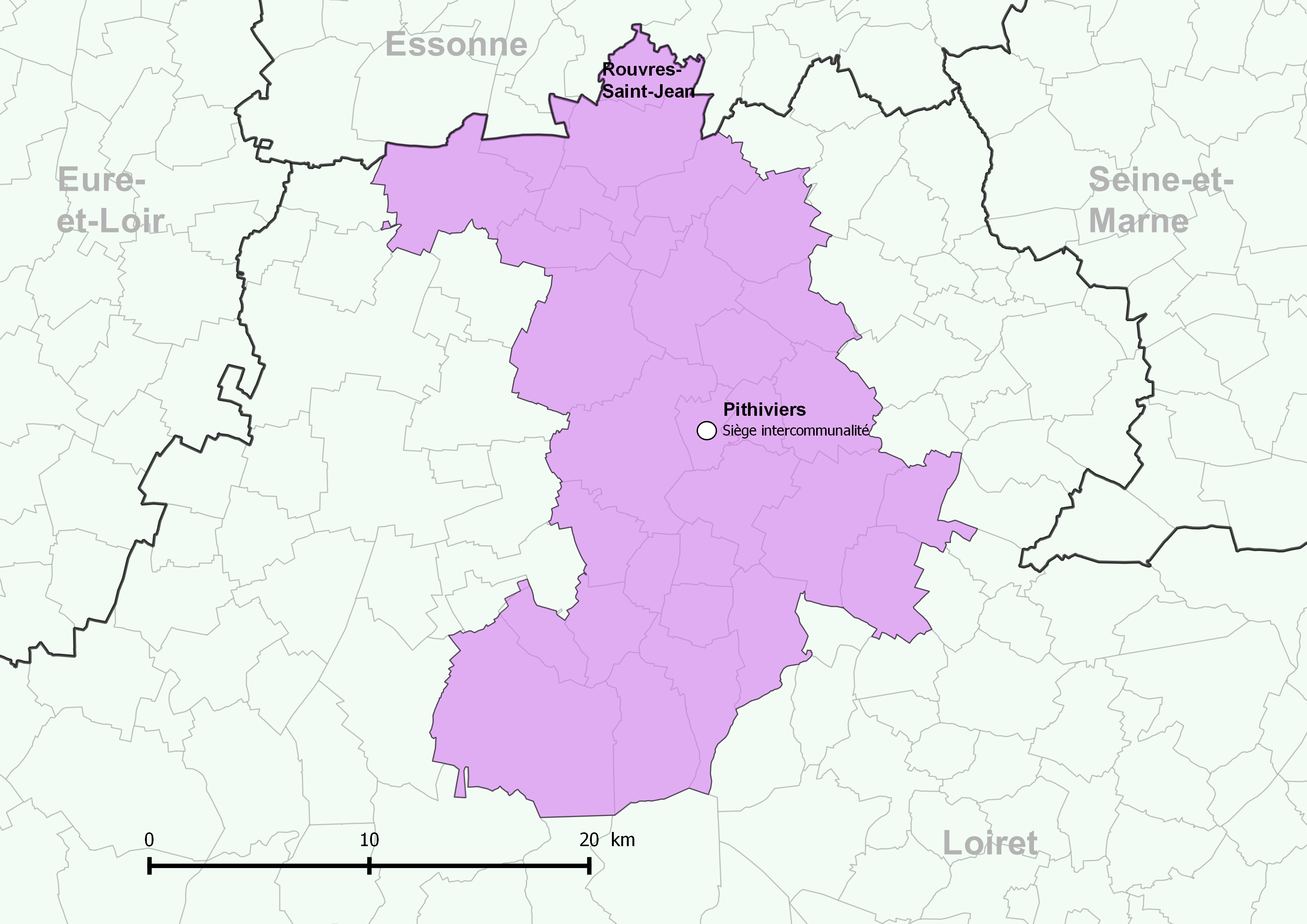 Périmètre de la communauté de communes du Pithiverais - Positionnement de la commune de Rouvres-Saint-Jean.